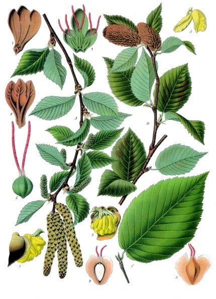 Zuckerbirke. A Blütenzweig. B Fruchtzweig. C ausgewachsenes Blatt. 1 weibliche Blüte von der Seite; 2 dieselbe von unten; 3 Staubblatt; 4 weibliche Blüten von innen; 5 eine derselben stärker vergrössert ; 6 Fruchtschuppe von aussen; 7 dieselbe von innen; 8 Früchte; 9 dieselbe im Längsschnitt.